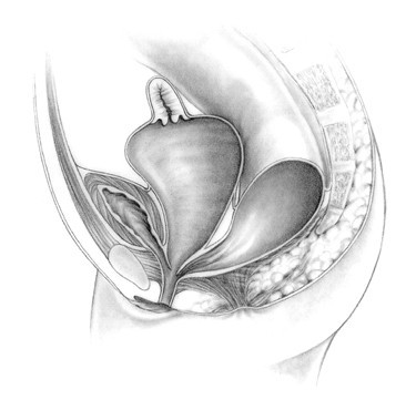 Cloacal fistula